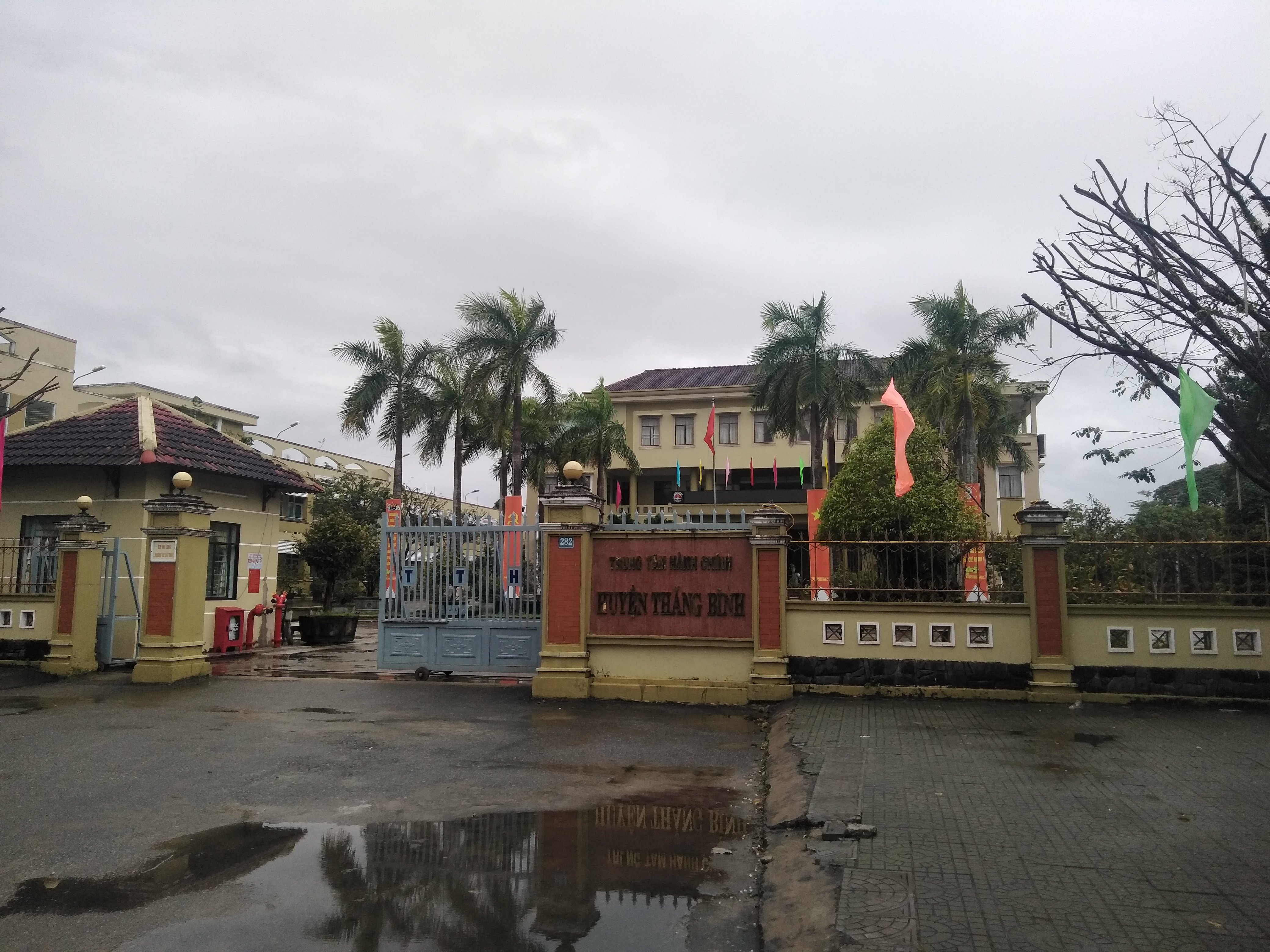 UBND huyện Thăng Bình, Quảng Nam